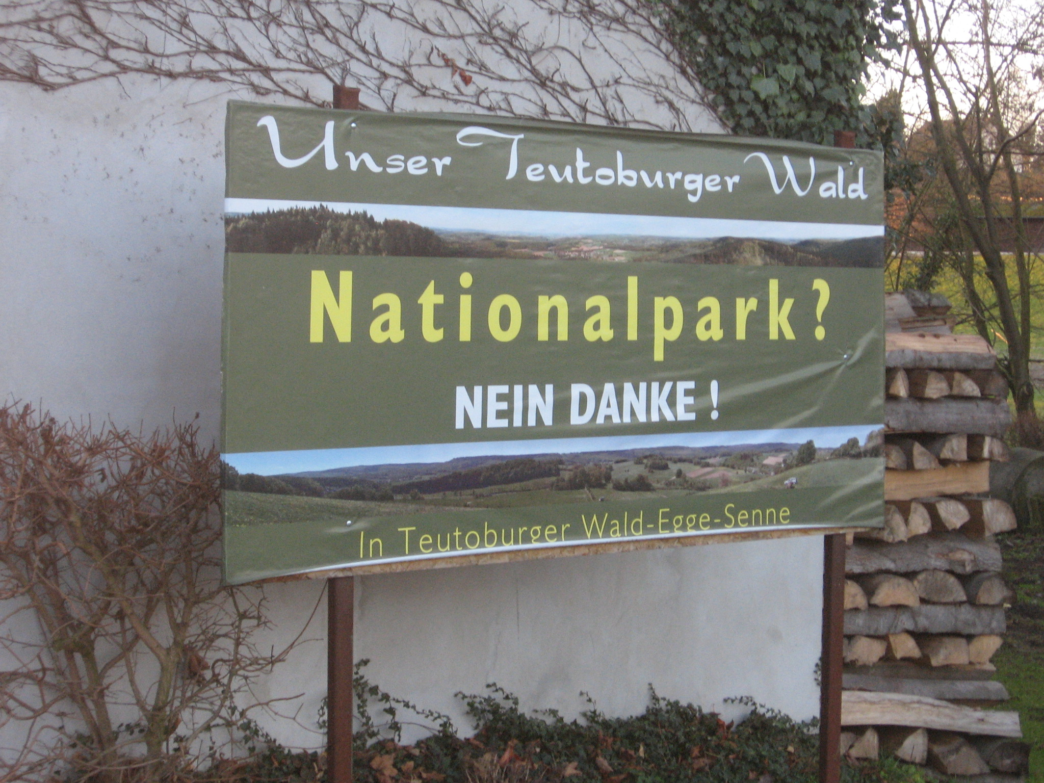 Schild vom Verein "Bürgerbewegung Unser Teutoburger Wald - Kein Nationalpark Teutoburger Wald/Egge", kurz BBUTW, in Schlangen-Kohlstädt